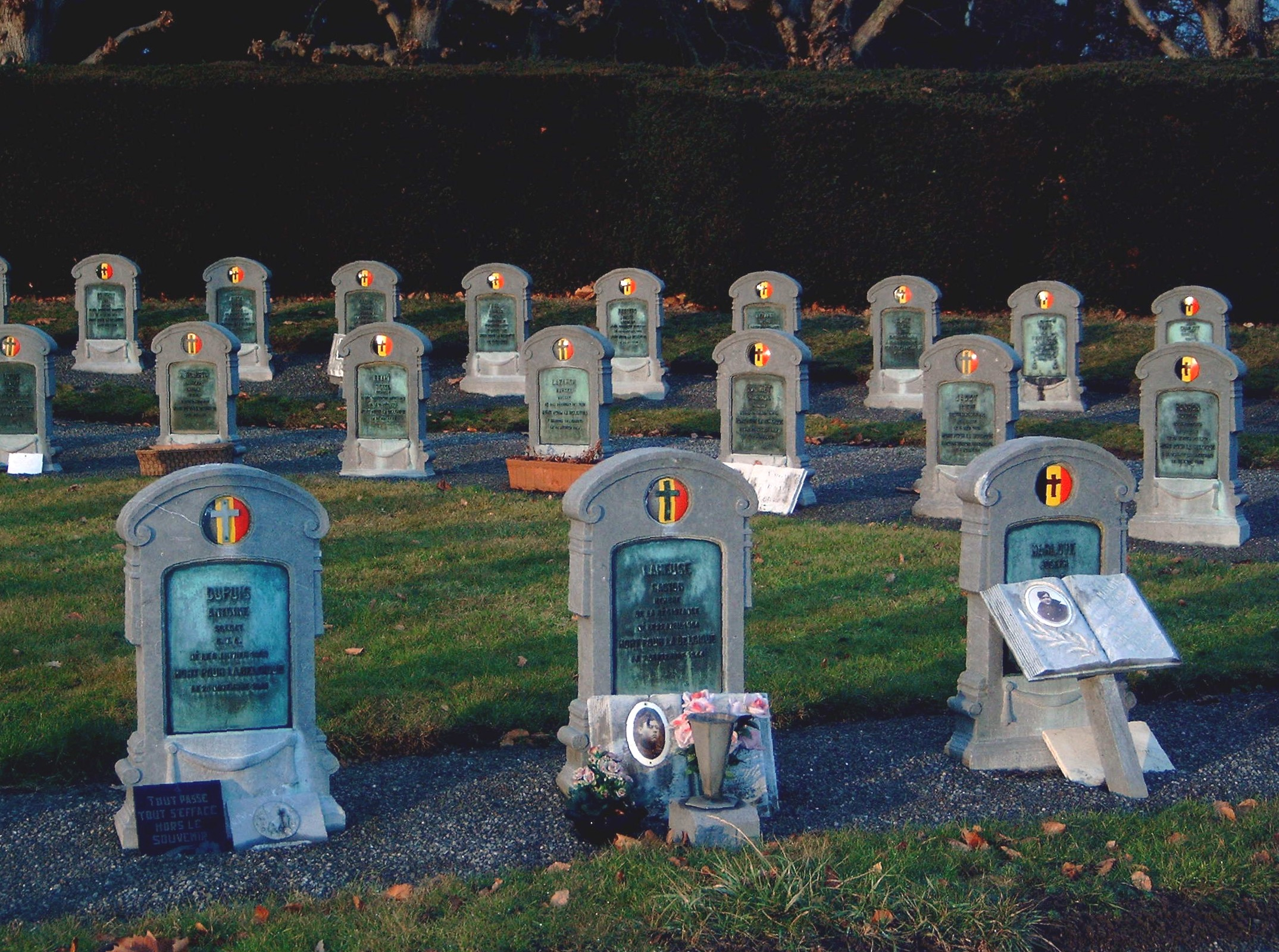 Militaire gedeelte van de begraafplaats van Belgrade (Namen). Eigen opname van 10 febr. 2006.